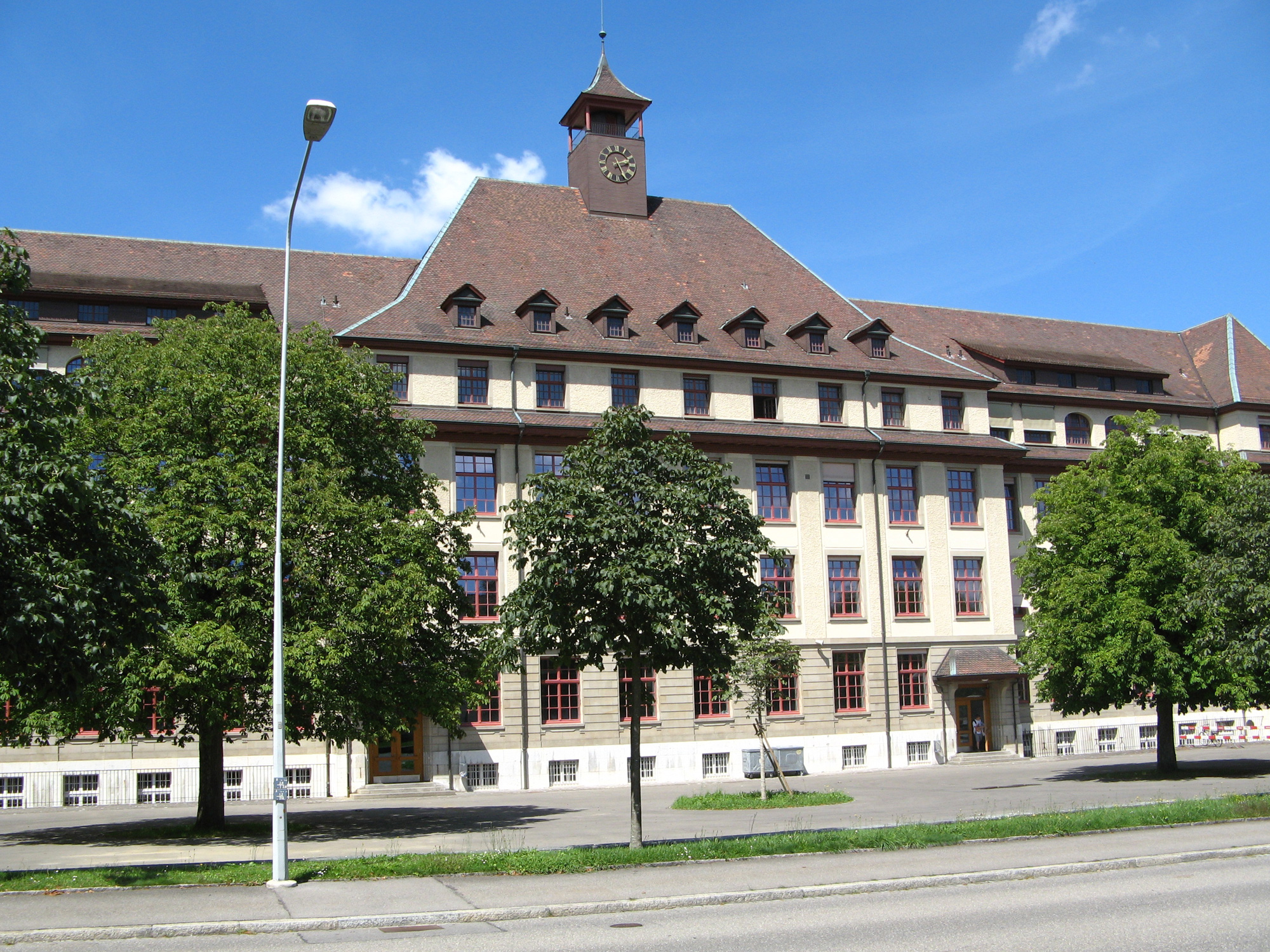 Zelglischulhaus in Aarau